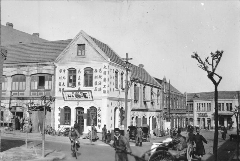 Tsingtau, Deutsche Bauten China, Tsingtau Deutsche Bauten 1898 "pachtete" das Deutsche Reich das sog. Kiautschau-Gebiet auf 99 Jahre. Noch heute ist der deutsche Charakter Tsingtaus erhalten, einer Stadt, die in den 16 Jahren deutscher Verwaltung anstelle einiger chinesischer Niederlassungen zu einem deutschen Handels- und Flottenstützpunkt ersten Ranges wurde. [Aufschrift des Schildes: "TA SHUN ZAI - Building Contractor" (Modelhaus)]